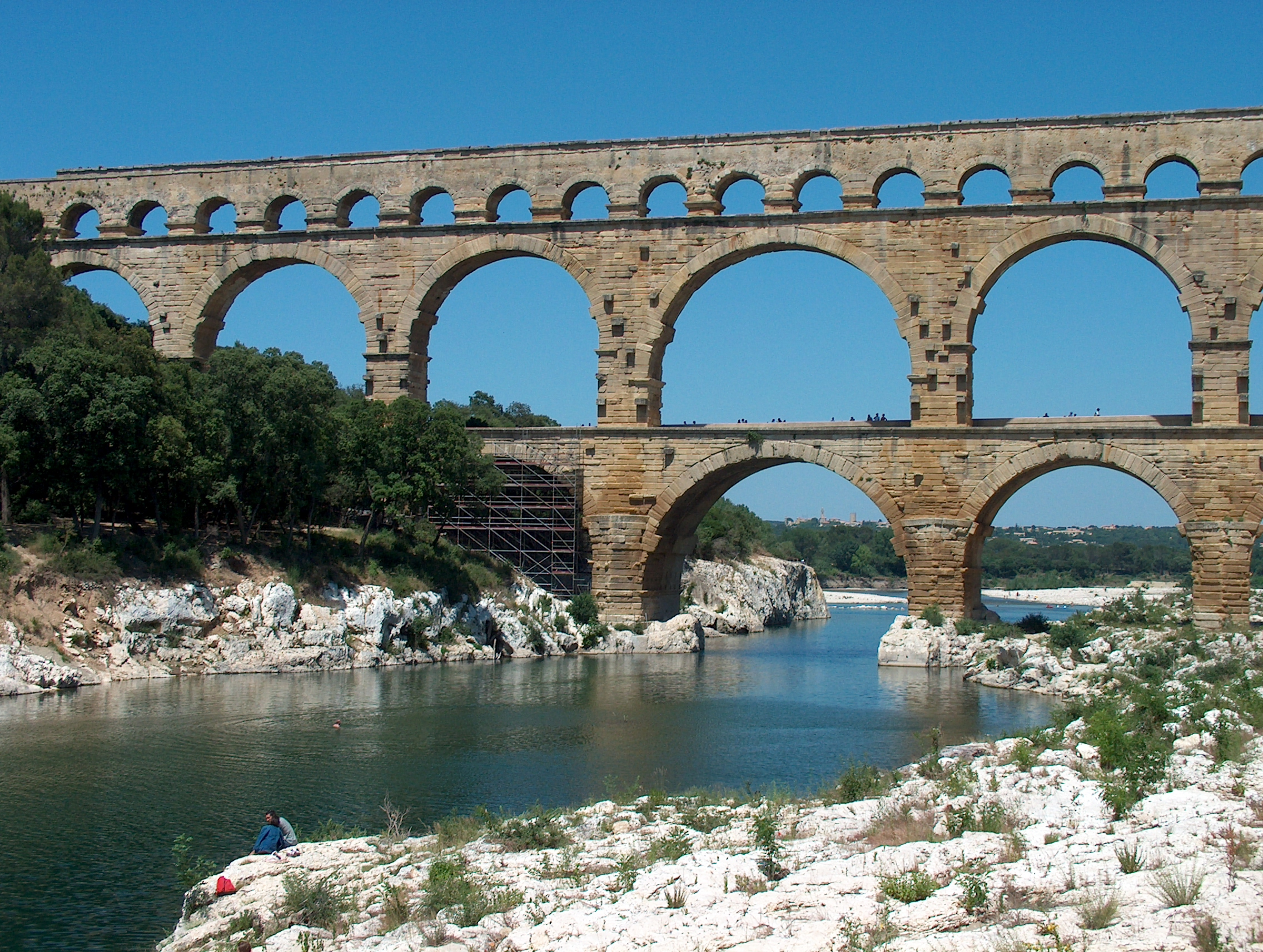 Das Aquädukt von Pont Du Gard: Ein beeidruckendes Bauwerk aus der Römerzeit.